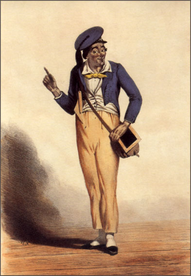 Johann Nepomuk Nestroy als Willibald (Die schlimmen Buben in der Schule)